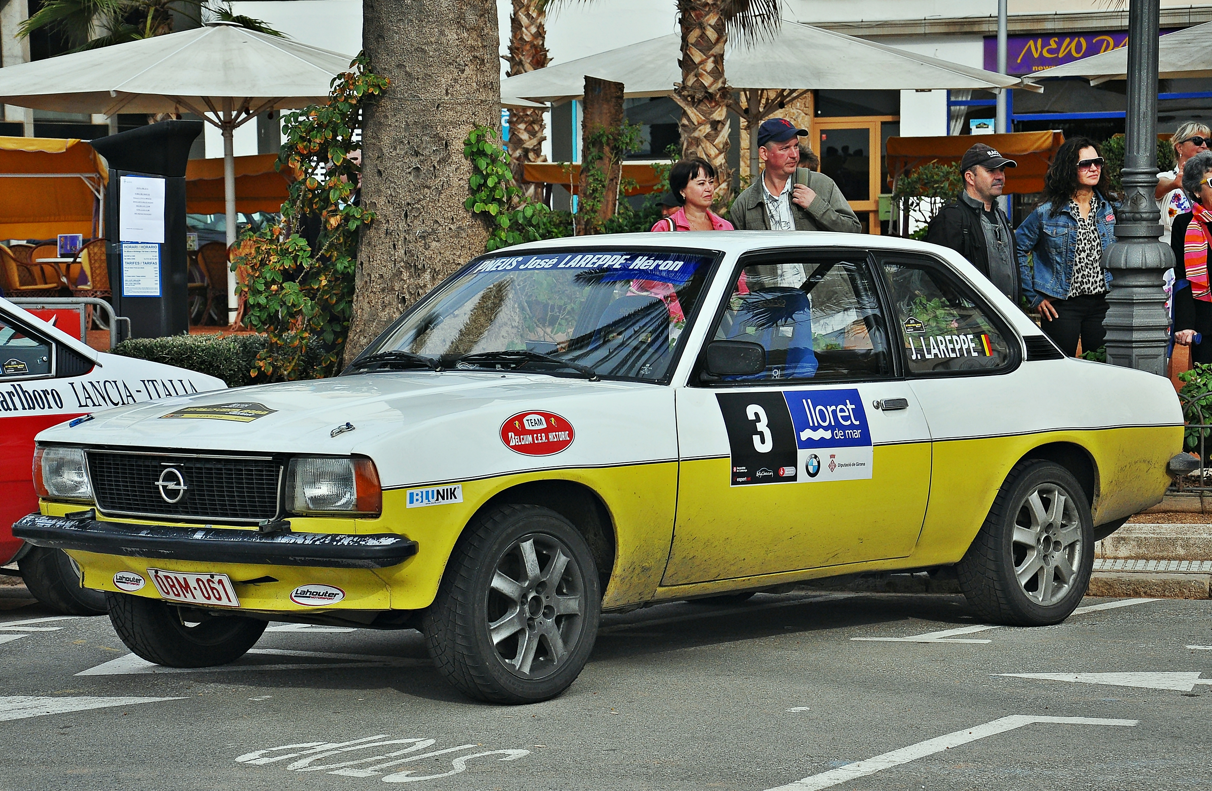 Opel Ascona-1975